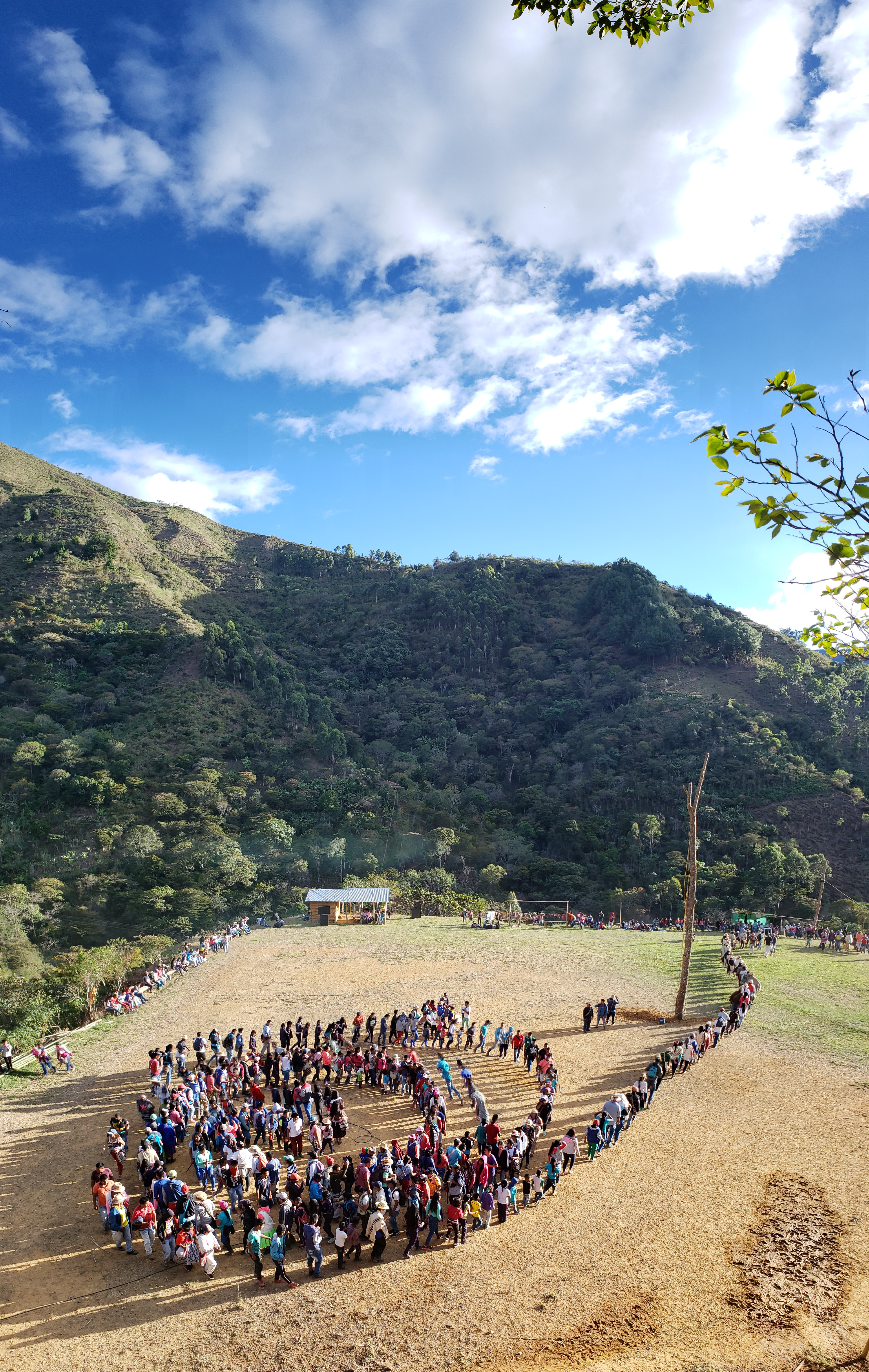 Ritual sagrado del Saakhelu, por medio del cual se ofrece comida al cóndor para garantizar la buena productividad de las semillas (realizado por el pueblo indígena nasa) en el resguardo de Jambaló (Cauca - Colombia), vereda Buena Vista - La Marqueza. Agosto de 2018.